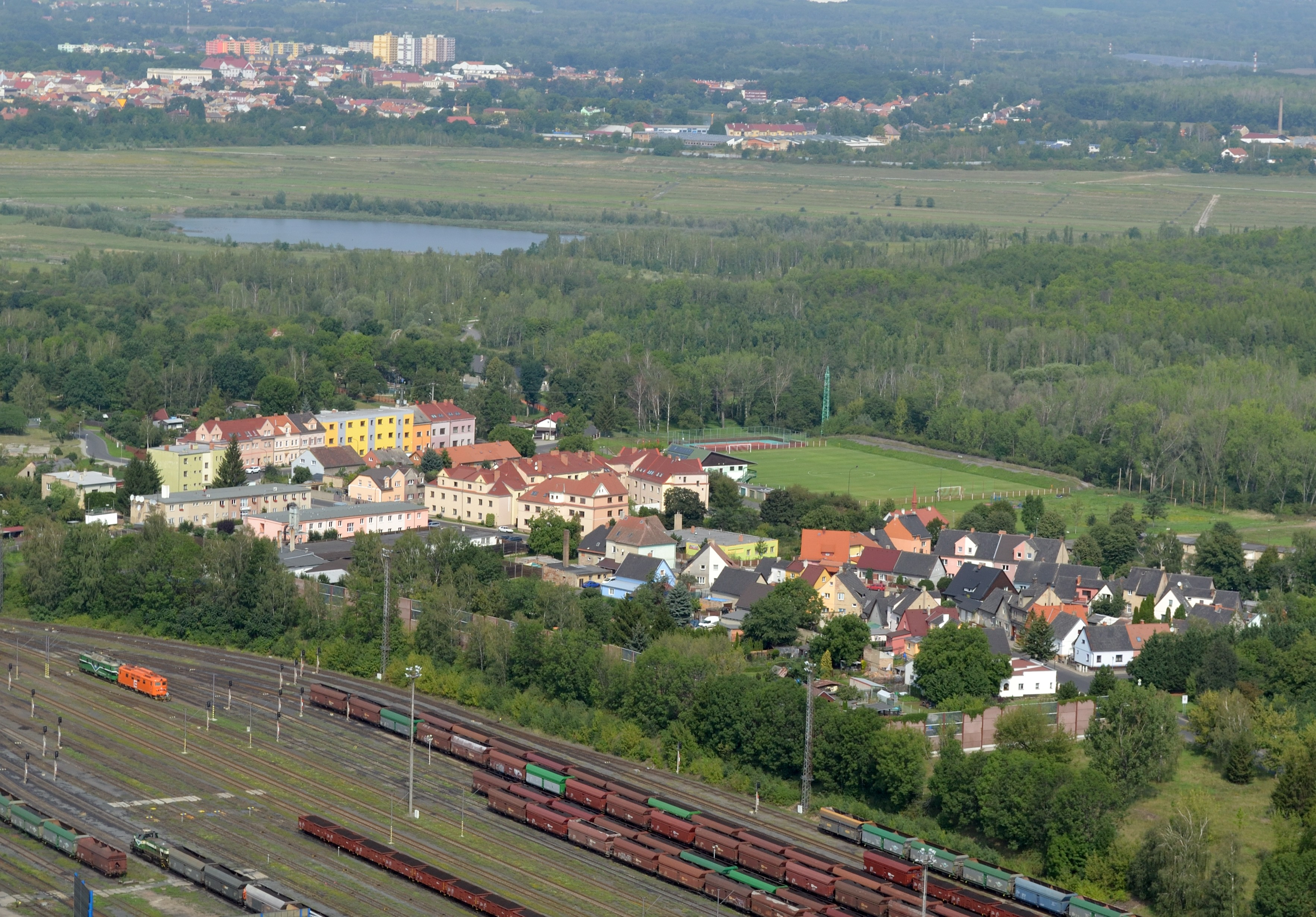 Ledvice - pohled z vyhlídky elektrárny Ledvice. V popředí město Ledvice, vzadu Duchcov.